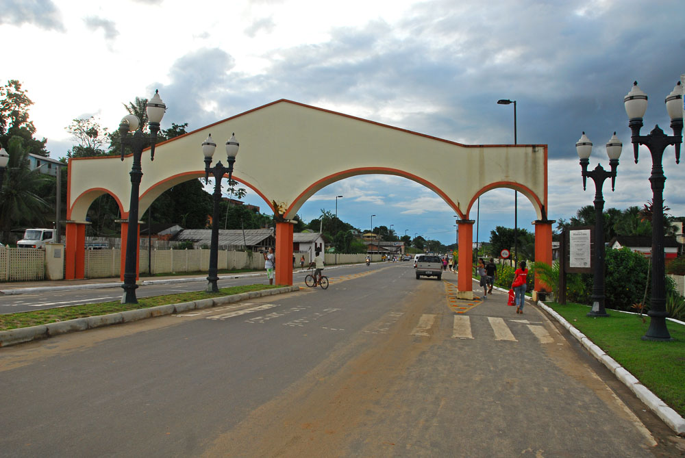 Foto: Gleilson Miranda / Governo do Acre Saiba mais